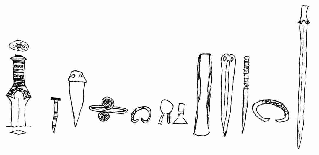 Leitfunde der Stufe Bronzezeit C nach Paul Reinecke